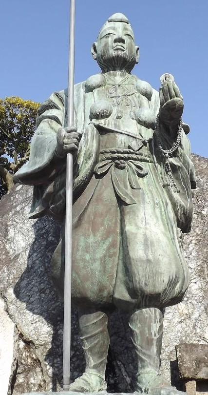 金倉寺の智証大師像